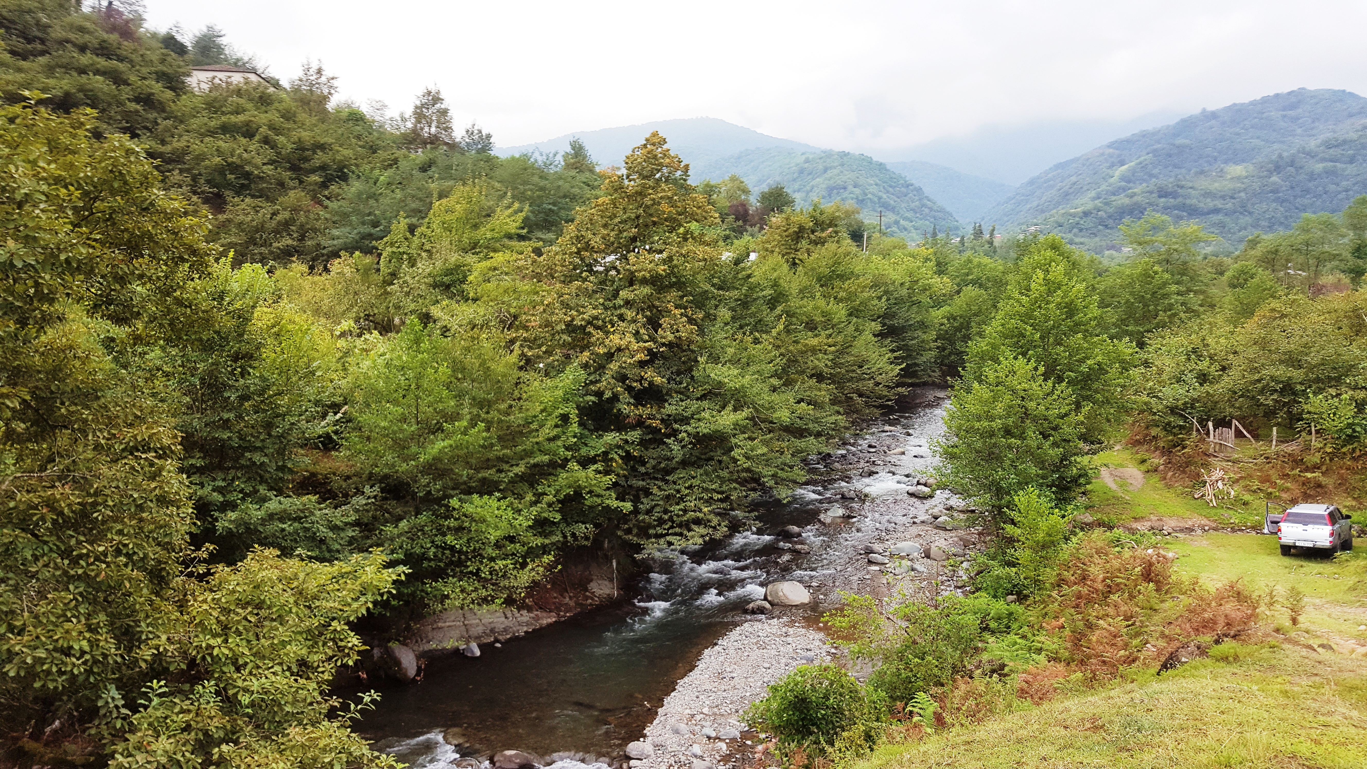 მდინარე სულორის ხეობა სოფელ სულორში